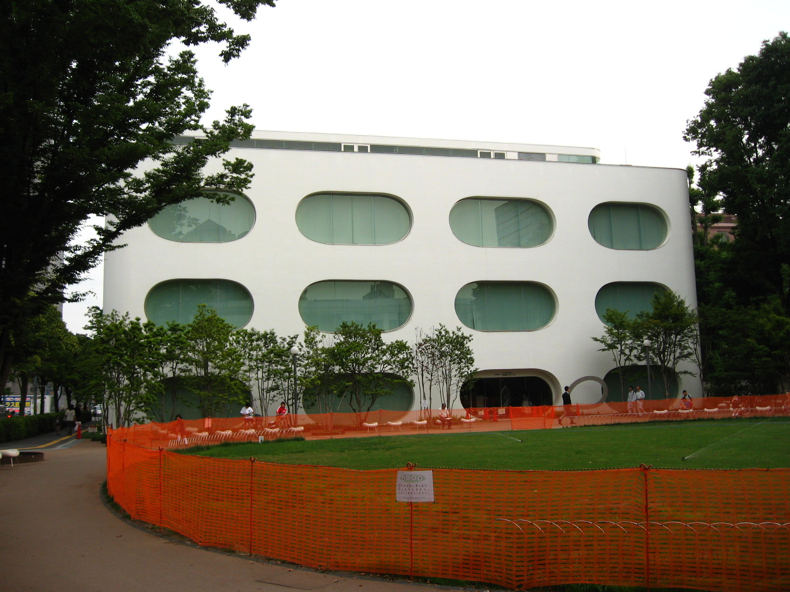 東京都武蔵野市境にある「武蔵野プレイス」。